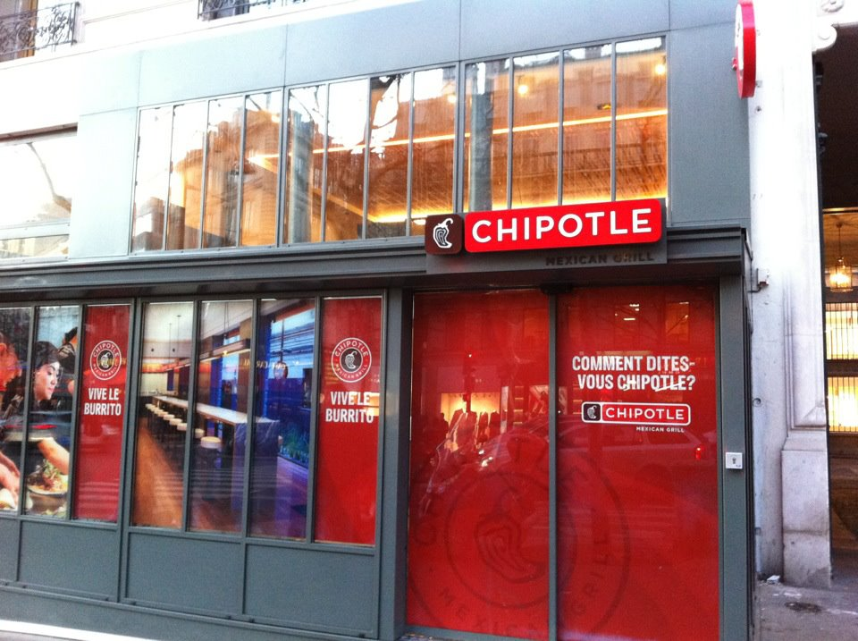 1er restaurant Chipotle de France, 18-20 Boulevard Montmartre, 75009 Paris, en janvier 2012 (en construction).